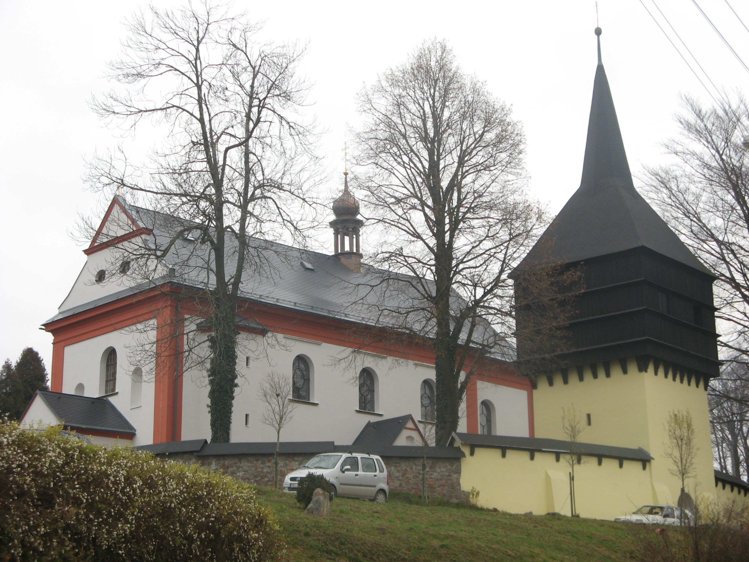 Kostel sv. Máří Magdaleny, Kamenná Horka, okres Svitavy